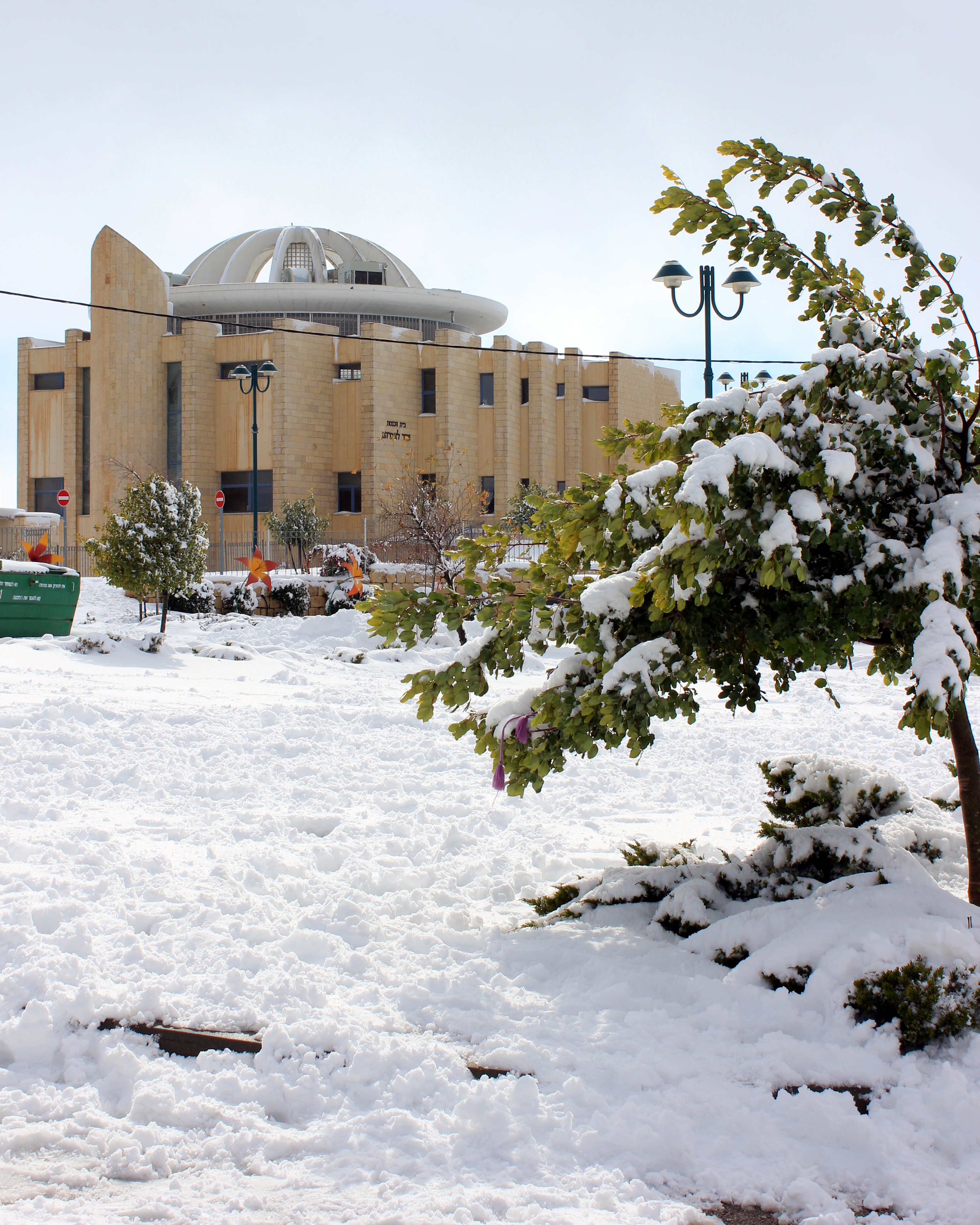 IMG_4439 Neve Daniel